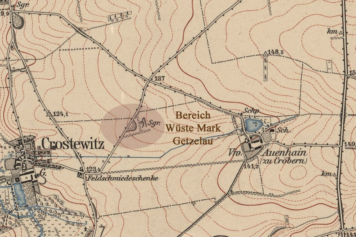 Ausschnitt von Blatt 26 (von 1907), Topographische Karte Sachsen 1:25000 (Messtischblätter), Abteilung für Landesaufnahme des Königl. Sächs. Generalstabes. Der Bereich der Wüsten Mark Getzelau wurde nach Angaben des gleichen Blattes von 1934 eingefügt.